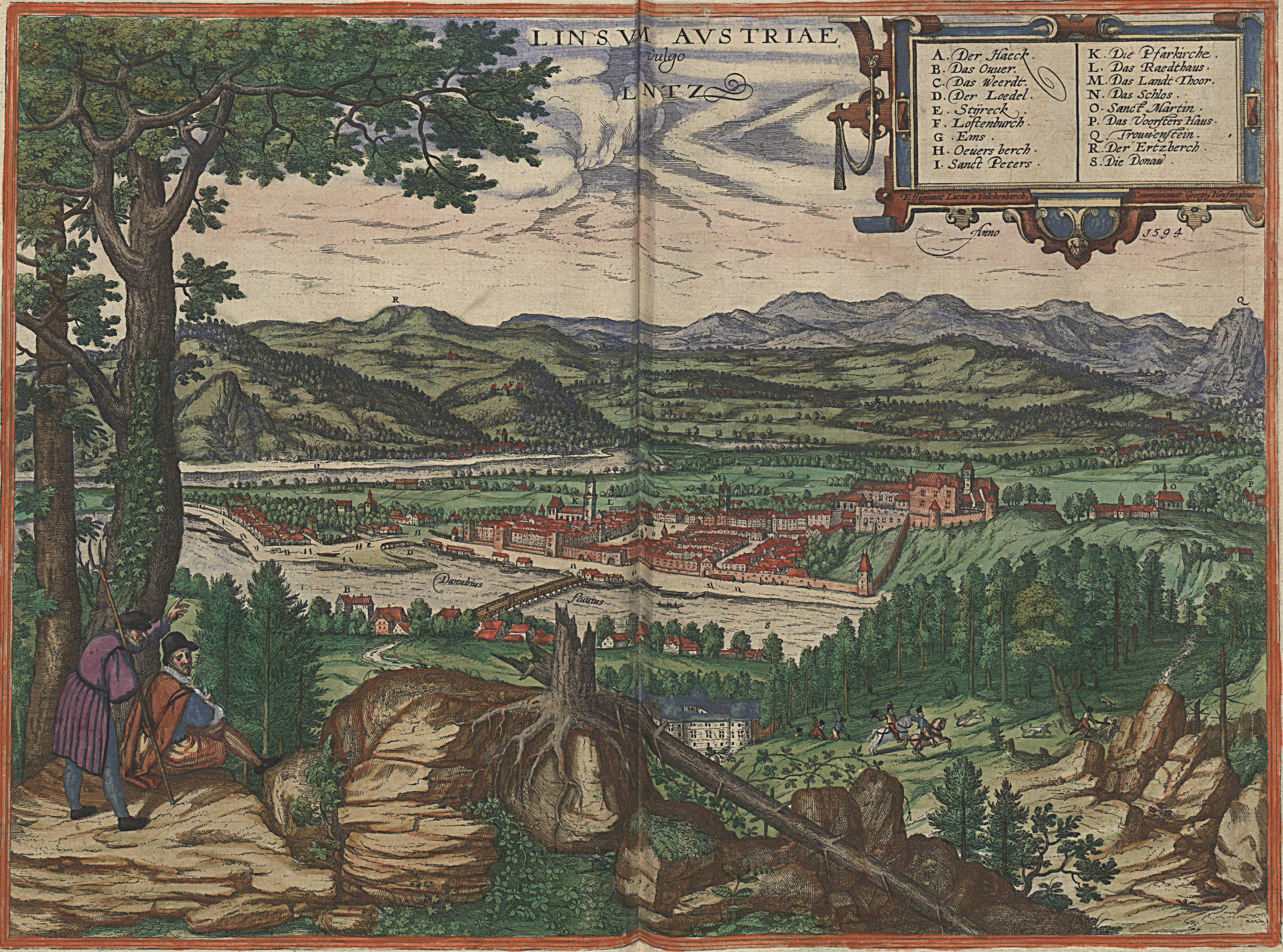 LINSVM AVSTRIAE vulgo LINTZ